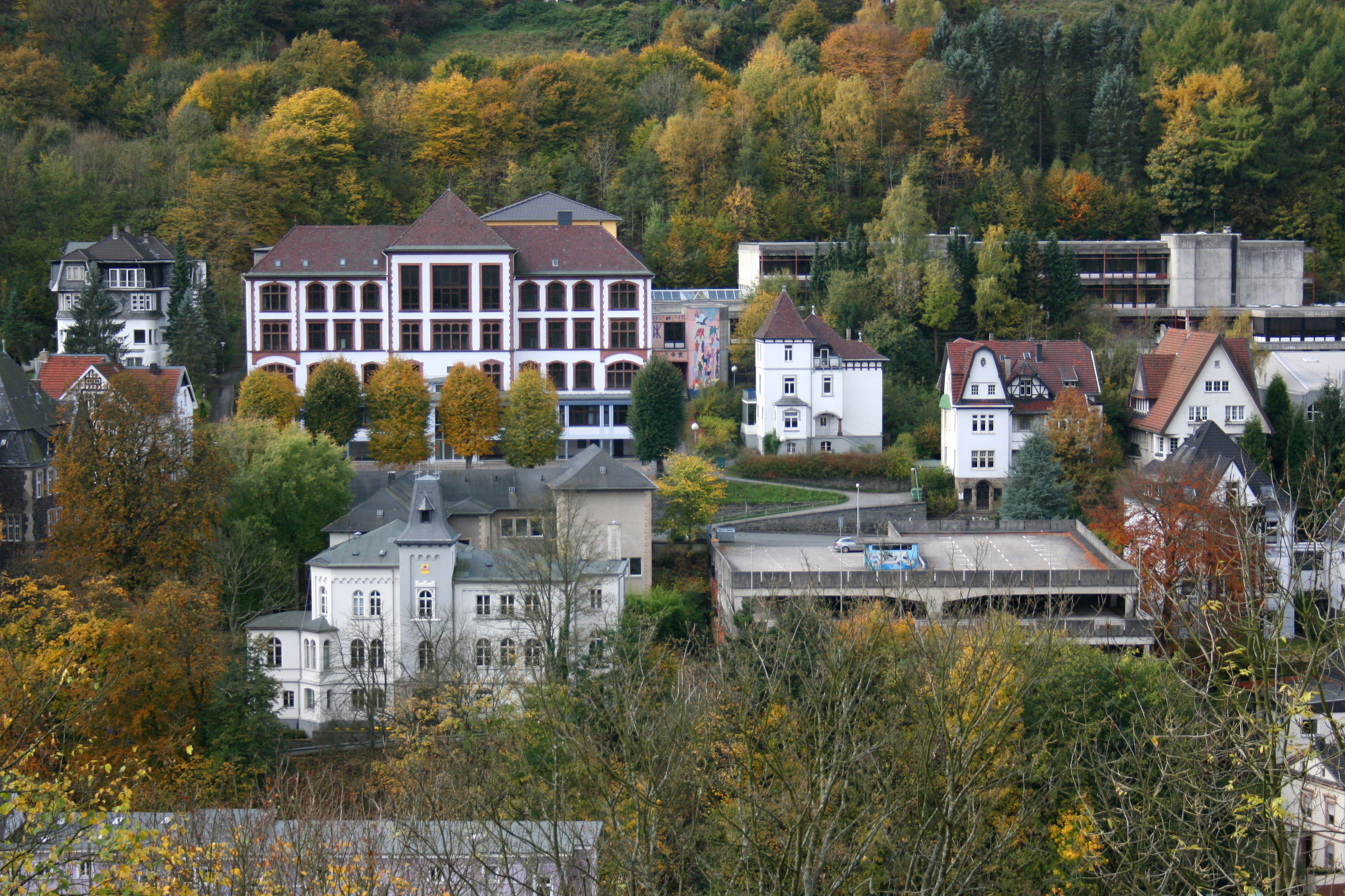 Altena